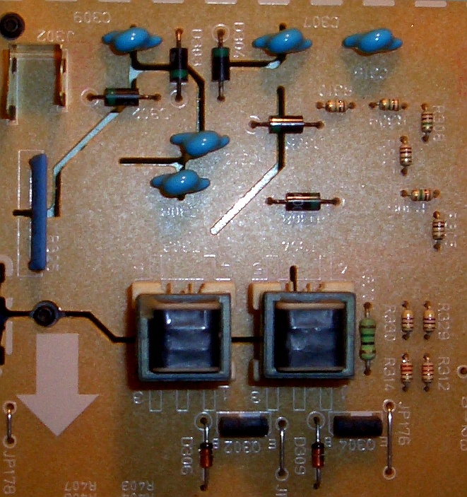 Hochspannungskaskade eines Laserdruckers auf einer Printplatte (PCB) mit Schlitzen zur Erhöhung der Kriechstromfestigkeit zwischen den Leiterbahnen